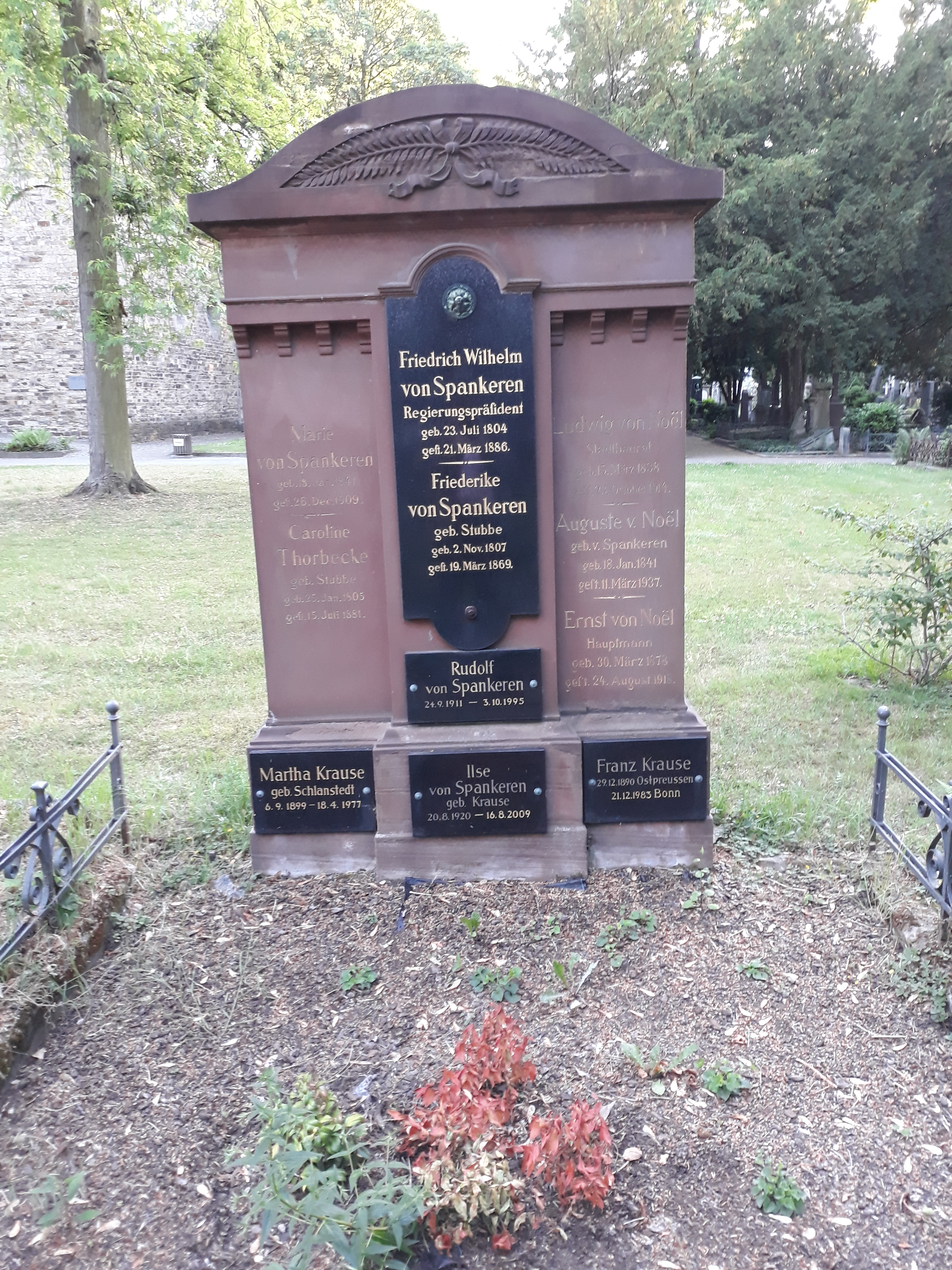 Das Grab des deutschen Verwaltungsjuristen (Regierungspräsident Düsseldorf) Friedrich-Wilhelm von Spankeren im Familiengrab auf dem Alten Friedhof Bonn.